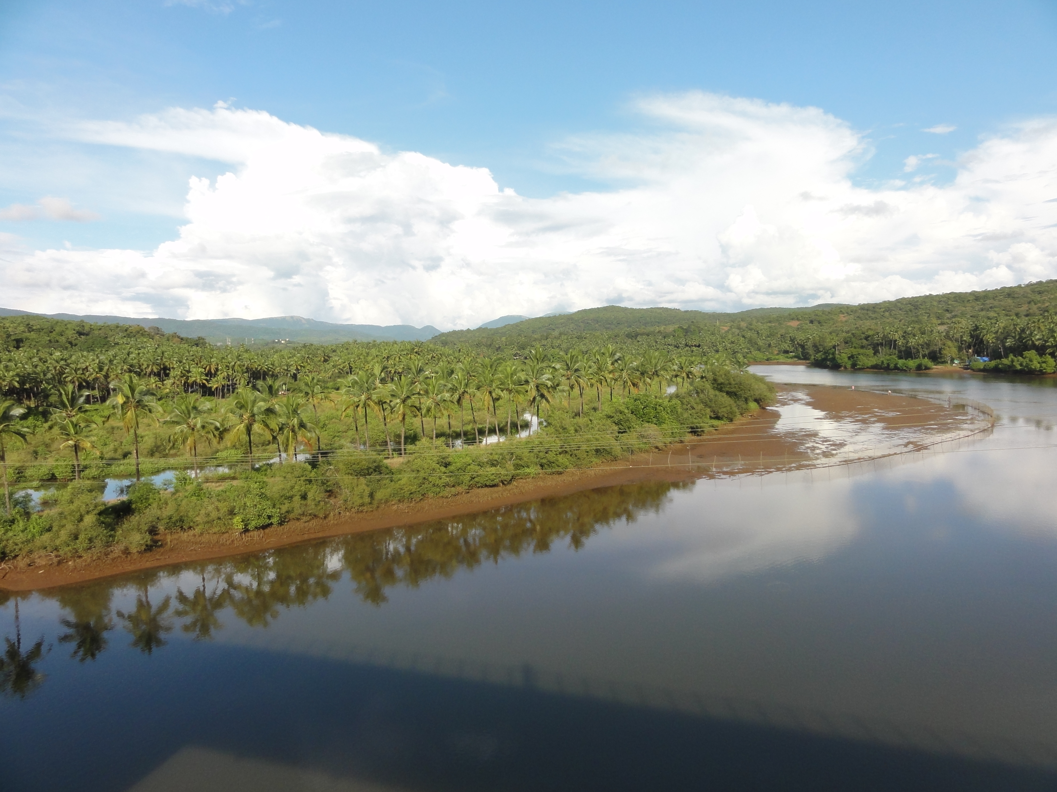 im Hinterland